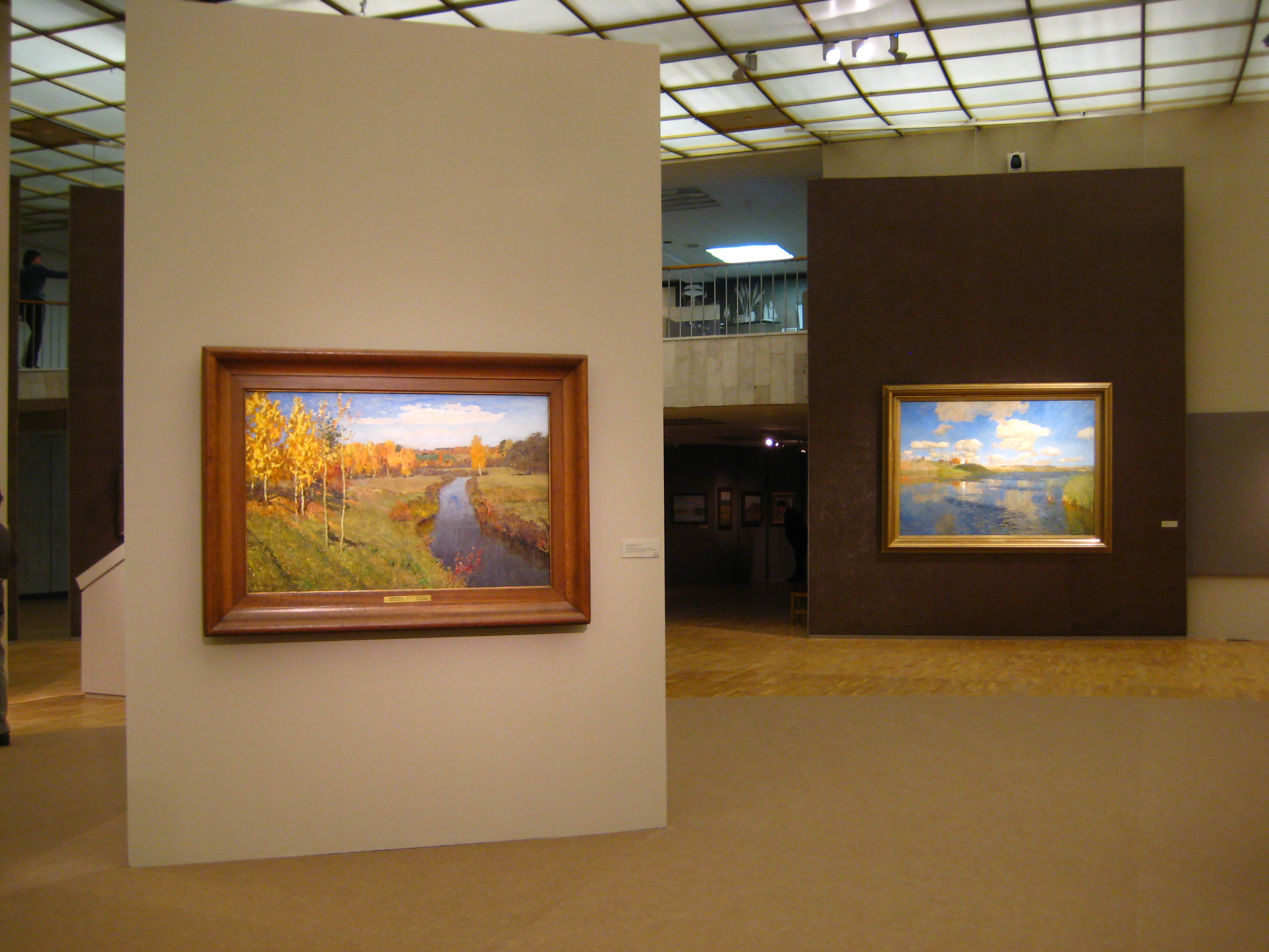 Выставка произведений Левитана, ГТГ на Крымском валу